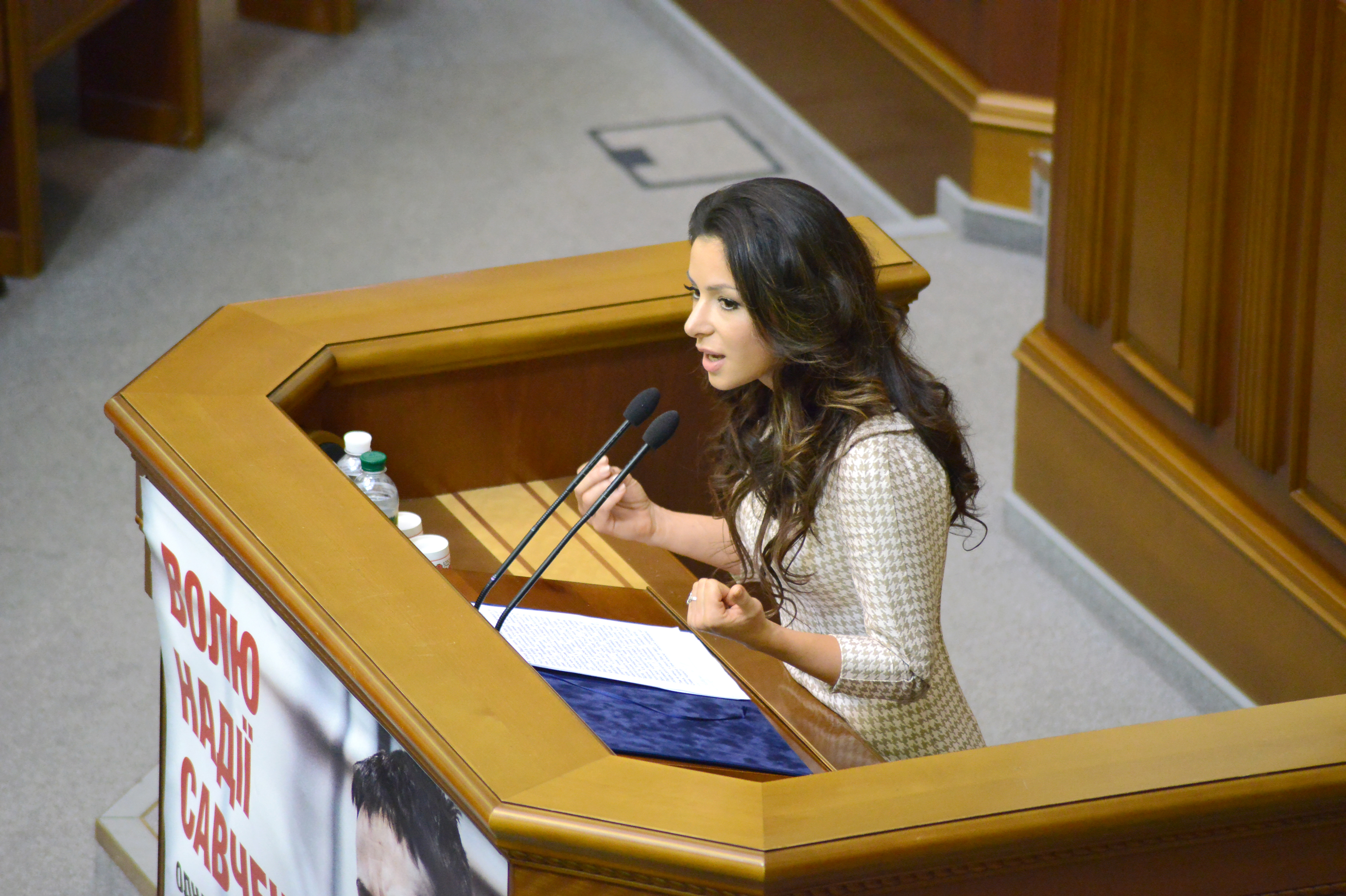 ВЕРХОВНА РАДА УКРАЇНИ 2015 , фото Вадим Чуприна